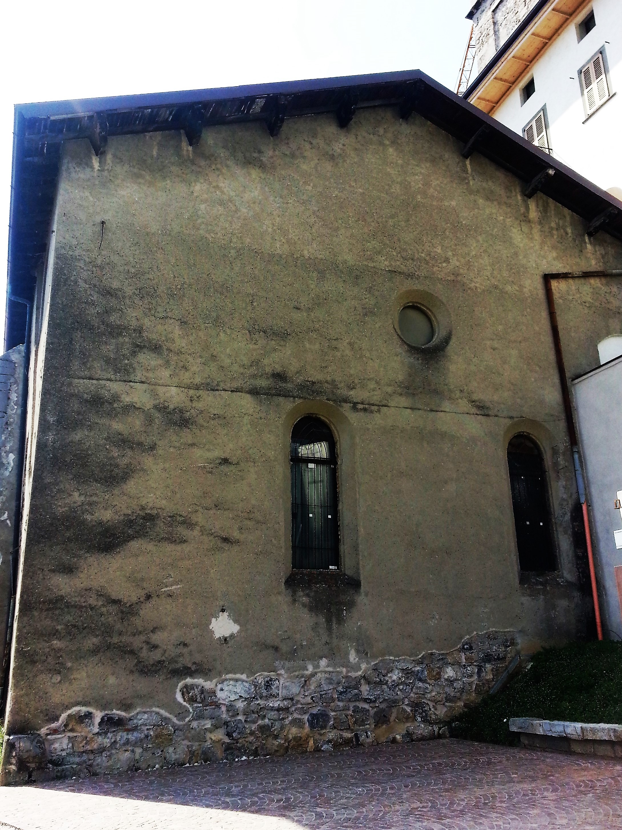 ex chiesa di santa Maria della Ripa. frazione Desenzano parte a nord